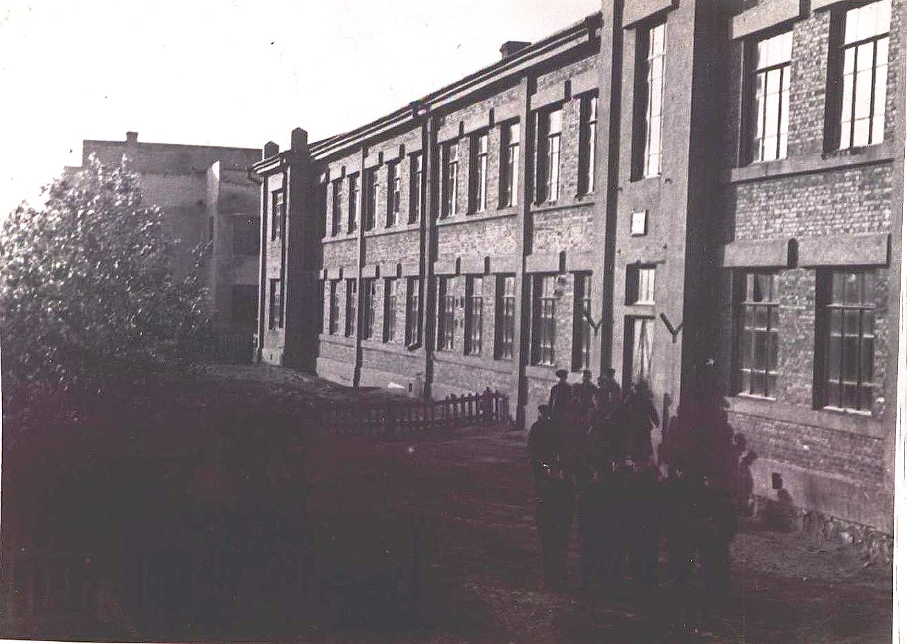 15 июня 1941г. школа ФЗО (фабрично-заводского обучения)